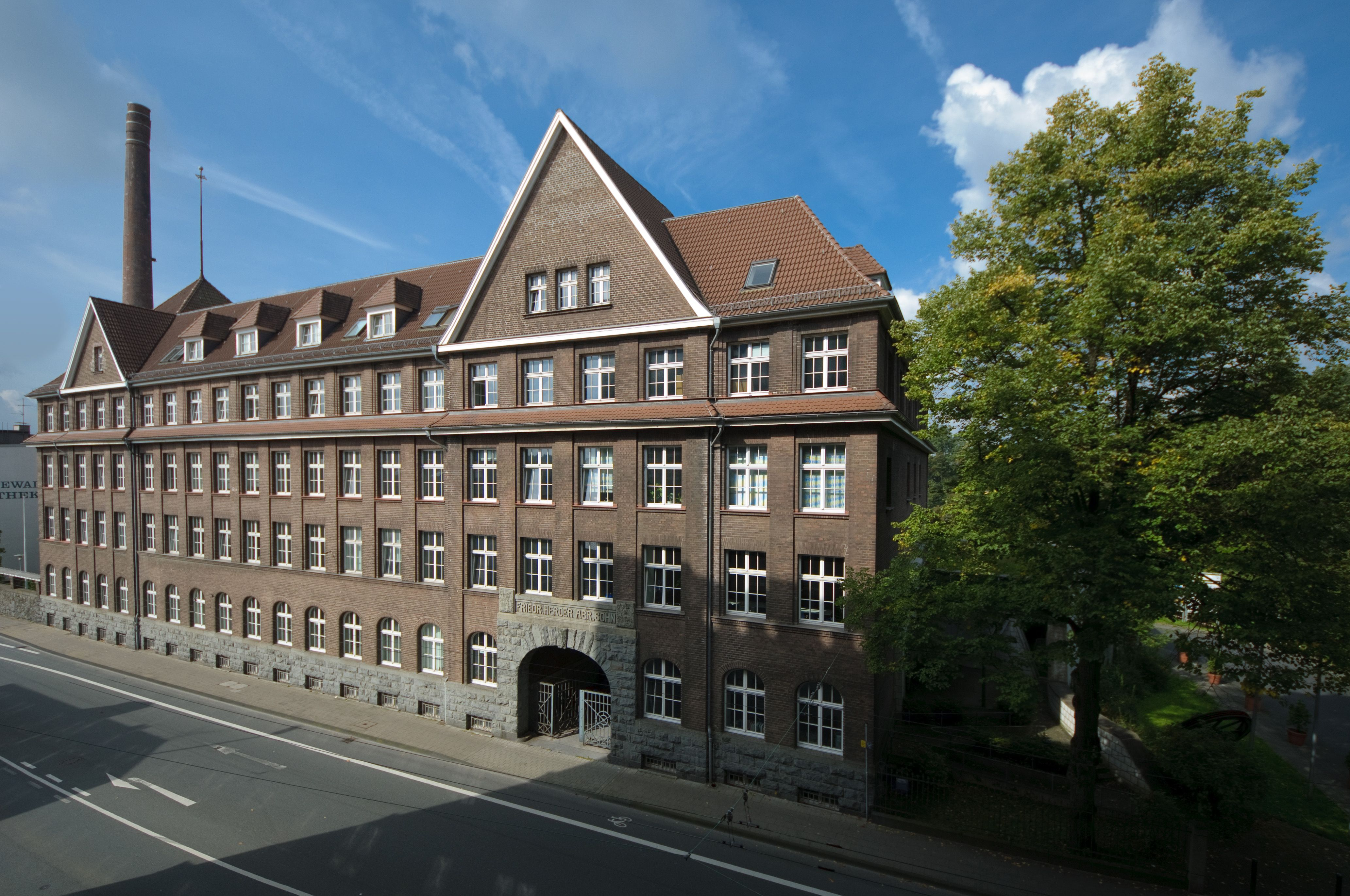 Friedrich Herder Abraham Sohn, Strassenfront